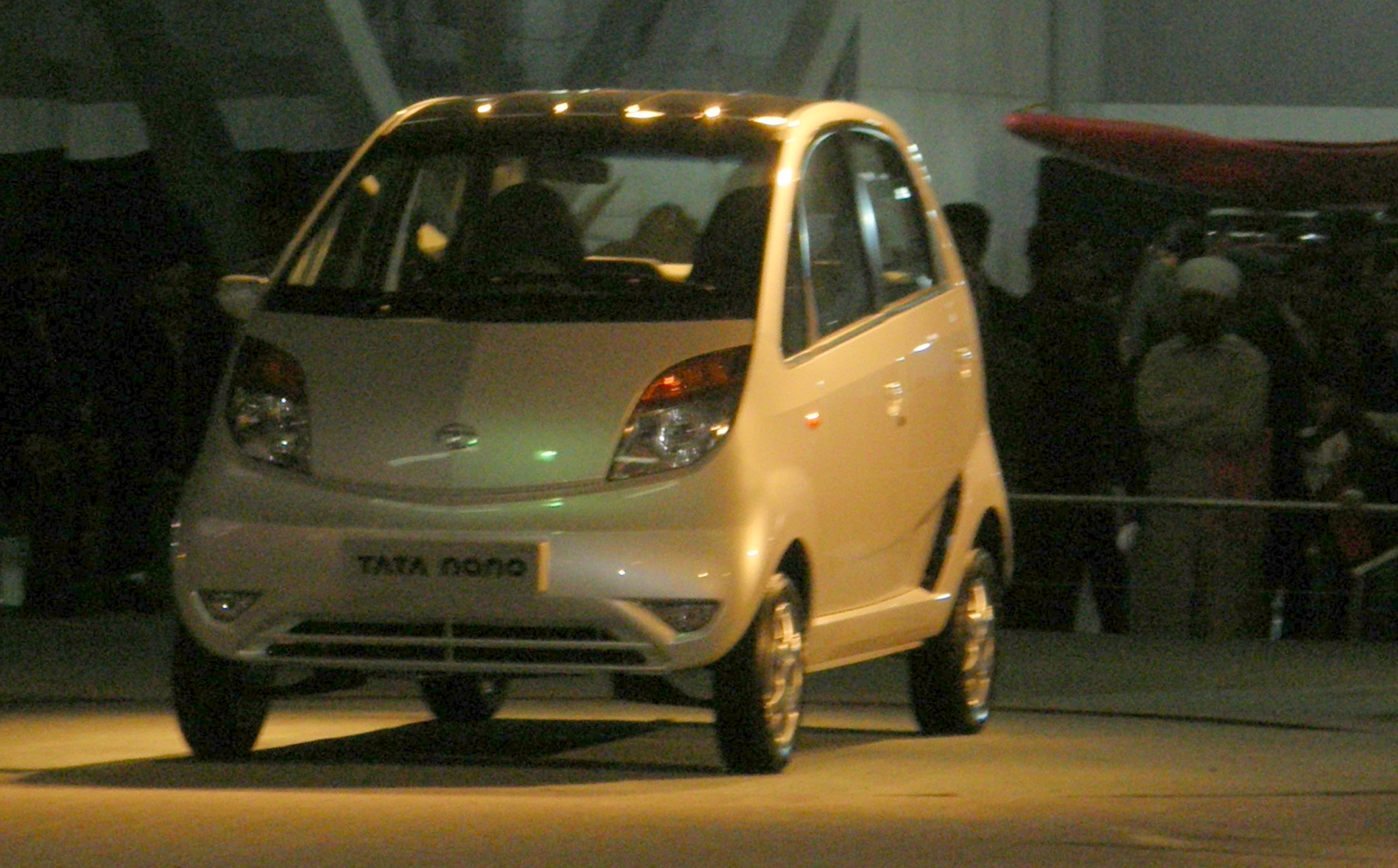 Further details